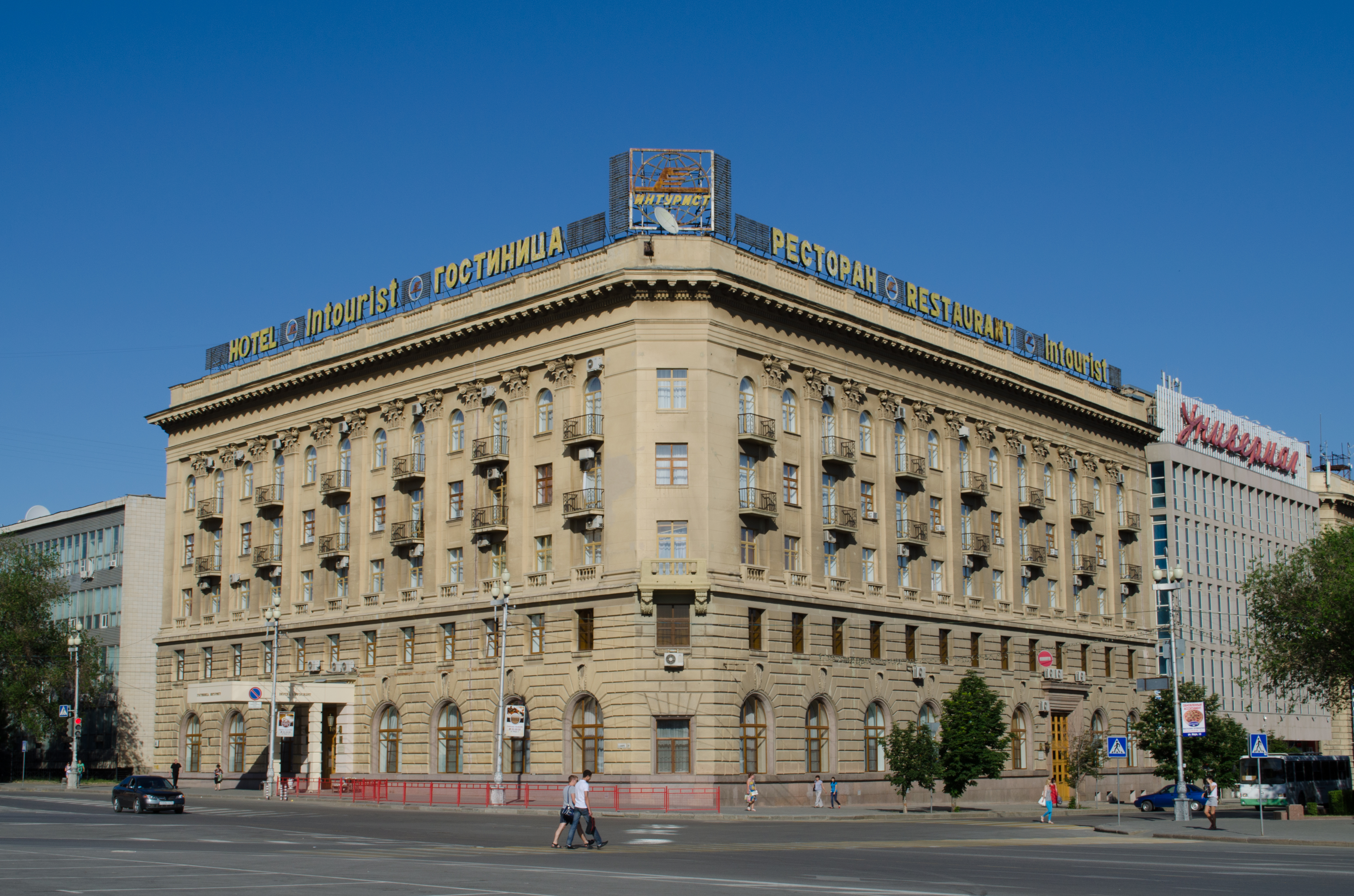 Здание гостиницы "Интурист", расположенной на площади Павших Борцов в Волгограде